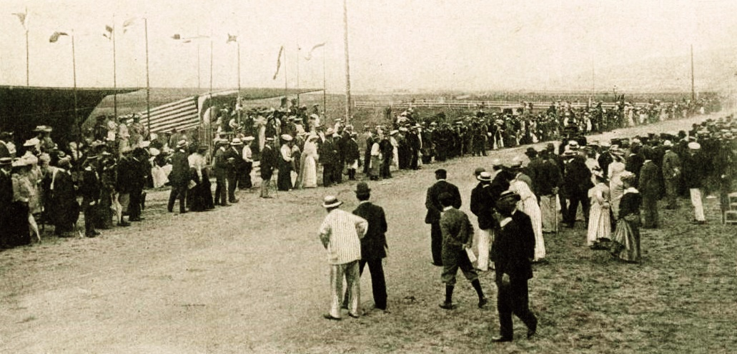 Le kilomètre de Deauville en septembre 1902 - La Vie au Grand Air du 6 septembre 1902, p.602